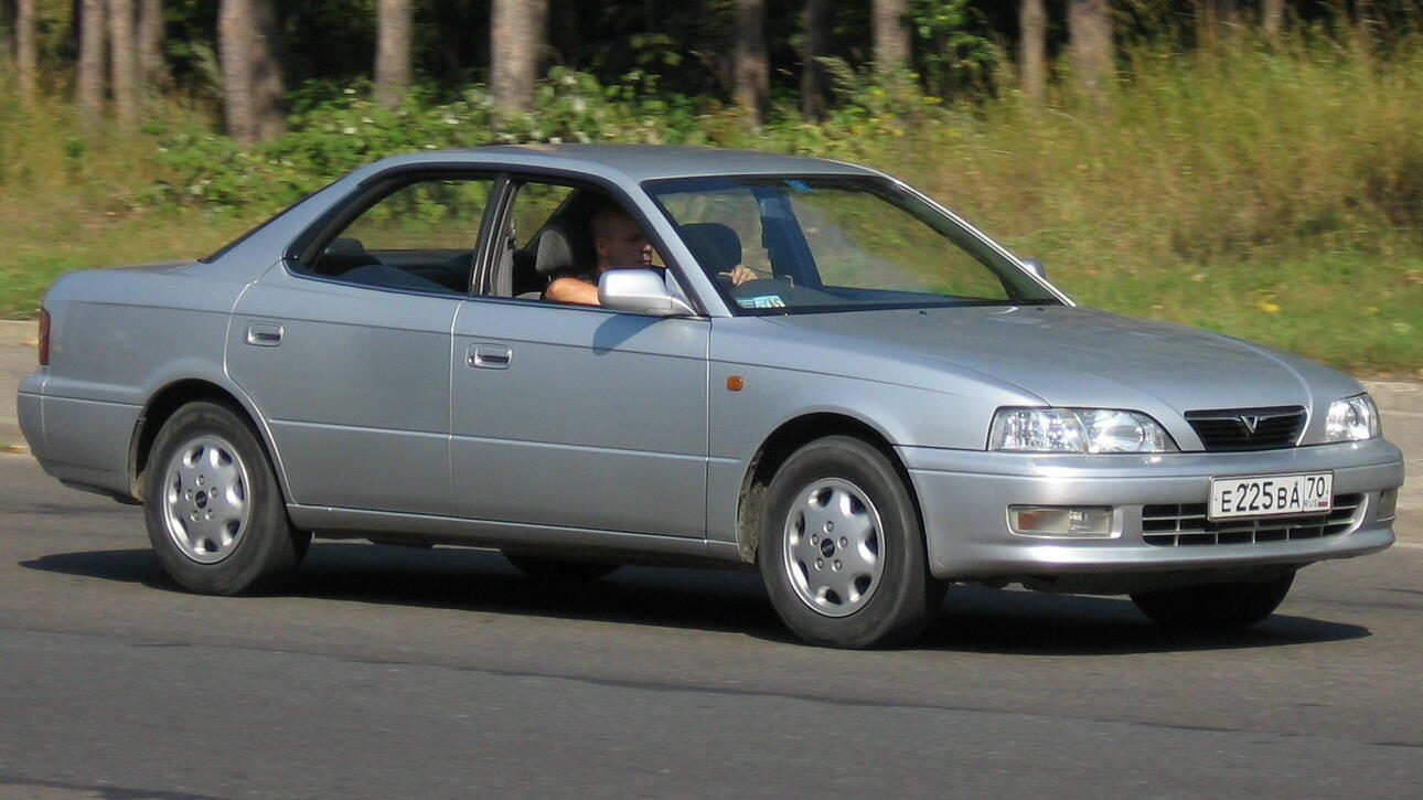 Photo taken in Seversk, Russia